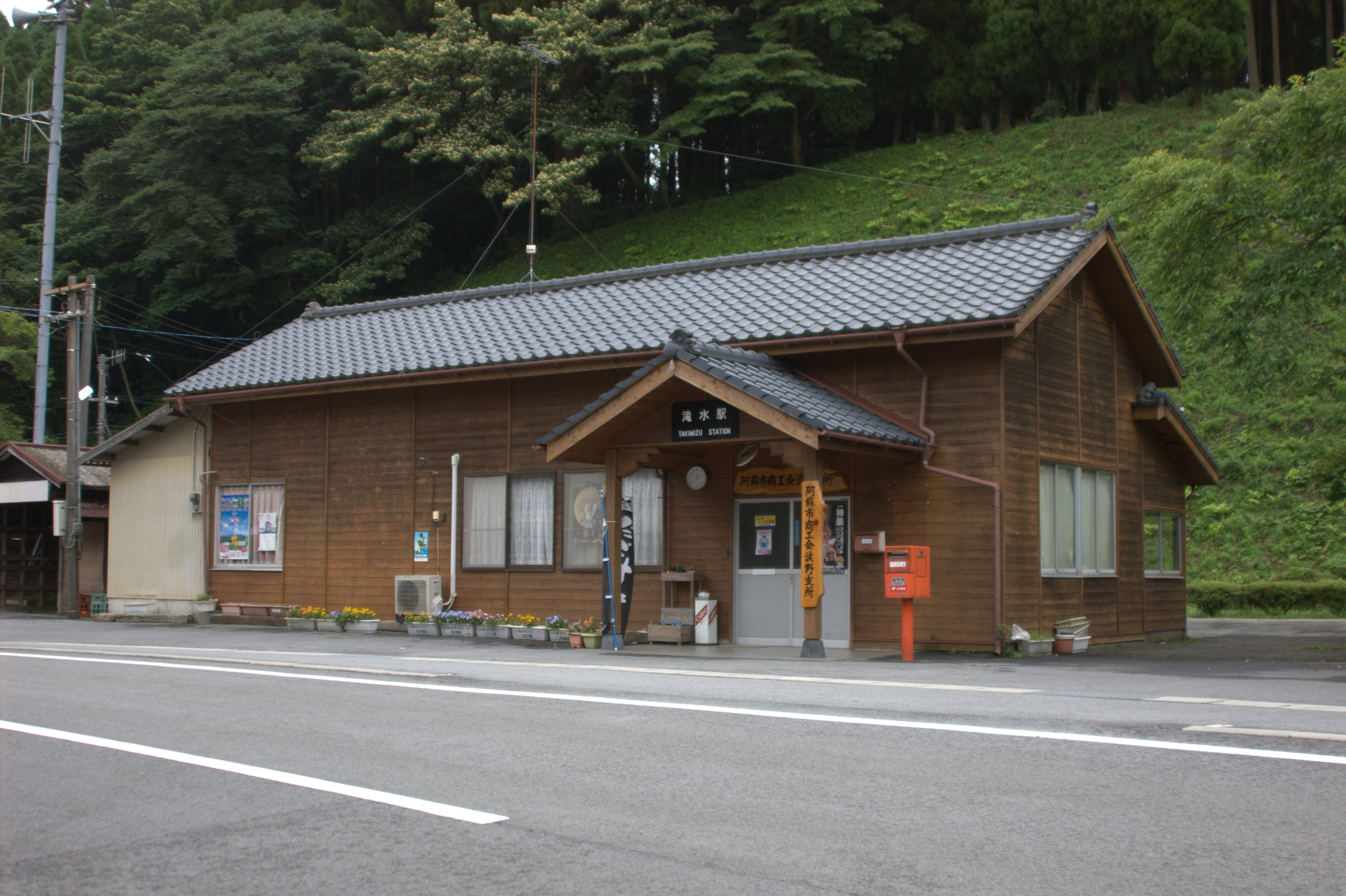 Takimizu Station on JR Kyushu Hohi Main Line on Kyushu island, Japan